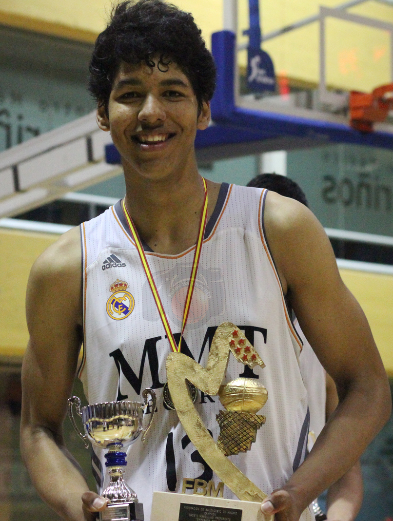 Felipe Dos Anjos